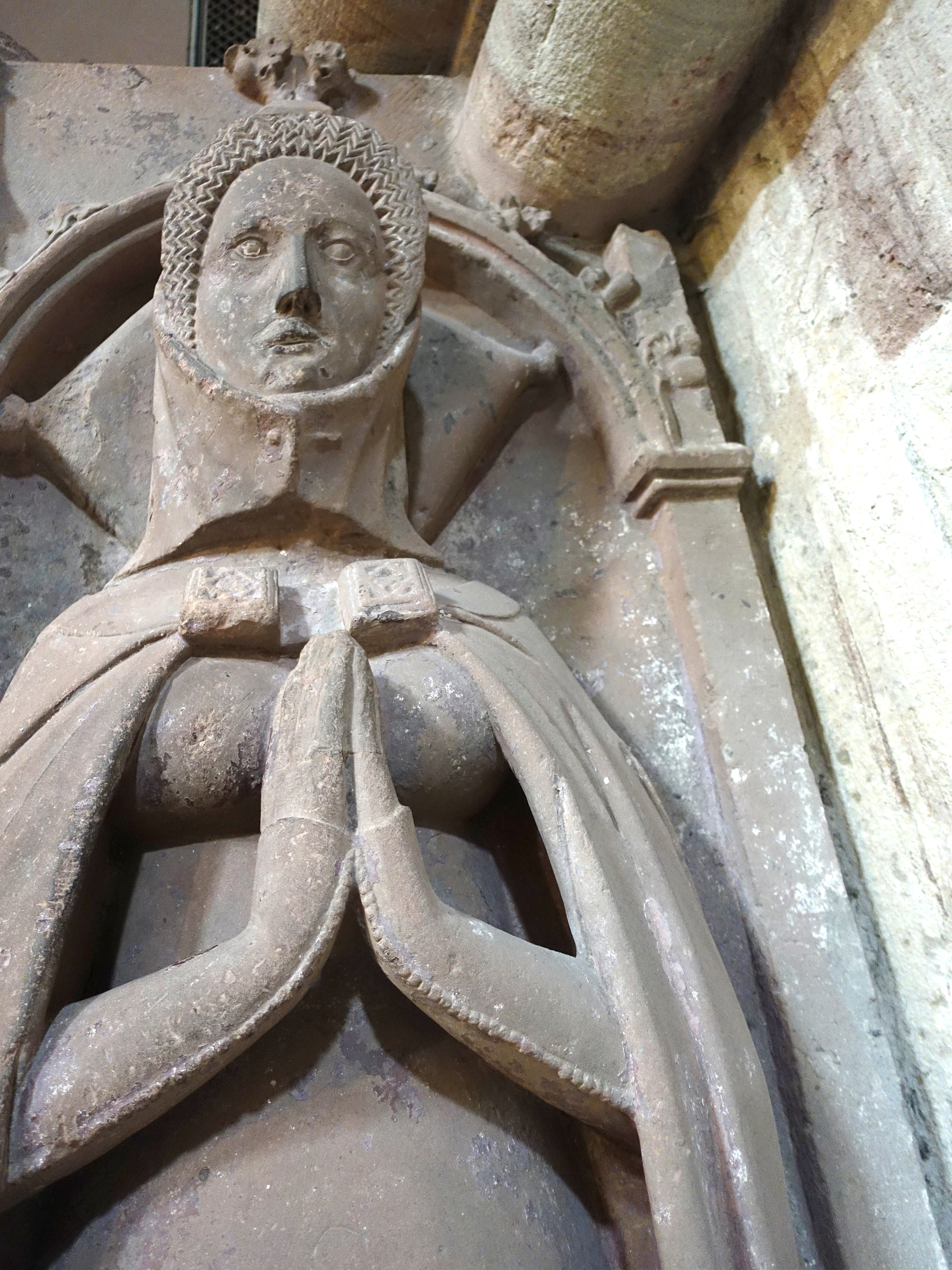 Katharina Marktgräfin von Baden. Geborene Gräfin von Thierstein (gestorben 1385) spätgotisches Figurengrabmal im Basler Münster